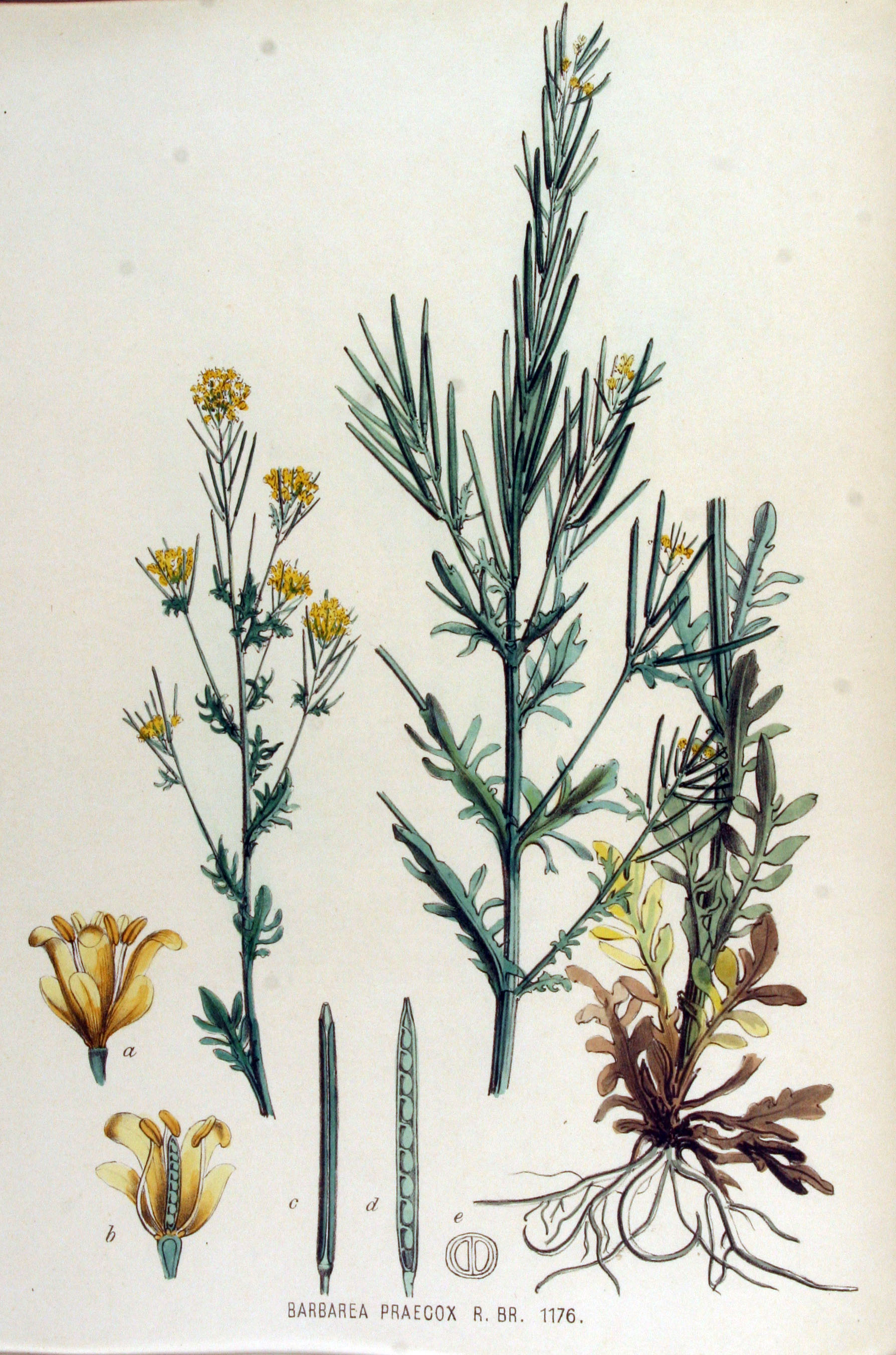 Barbarea verna (Mill.) Aschers. (Syn.Barbarea praecox (Smith) R. Brown)